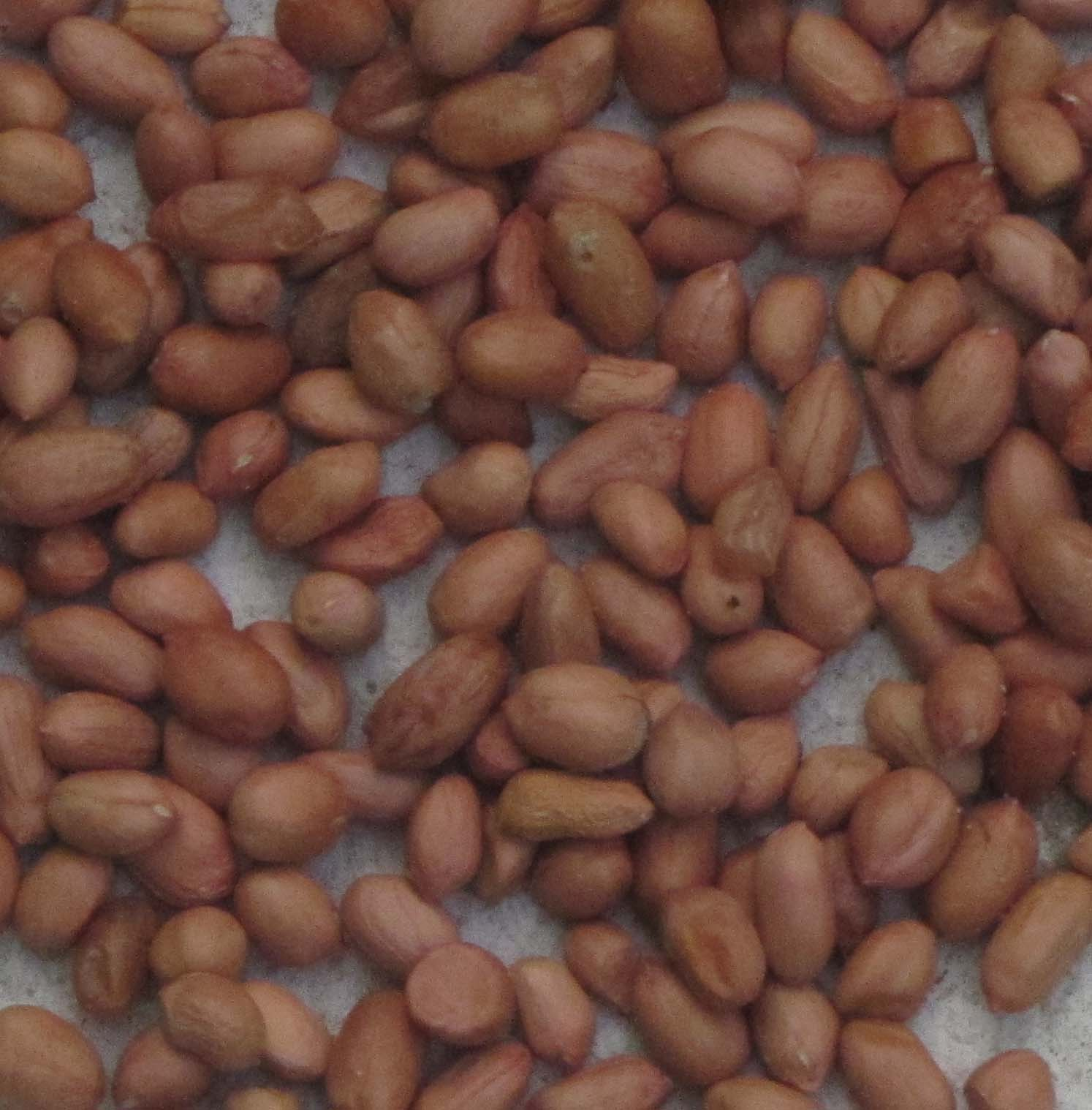 வேர்க்கடலைப் பருப்பு, நிலக்கடலைப் பருப்பு - உணவுப்பொருள்